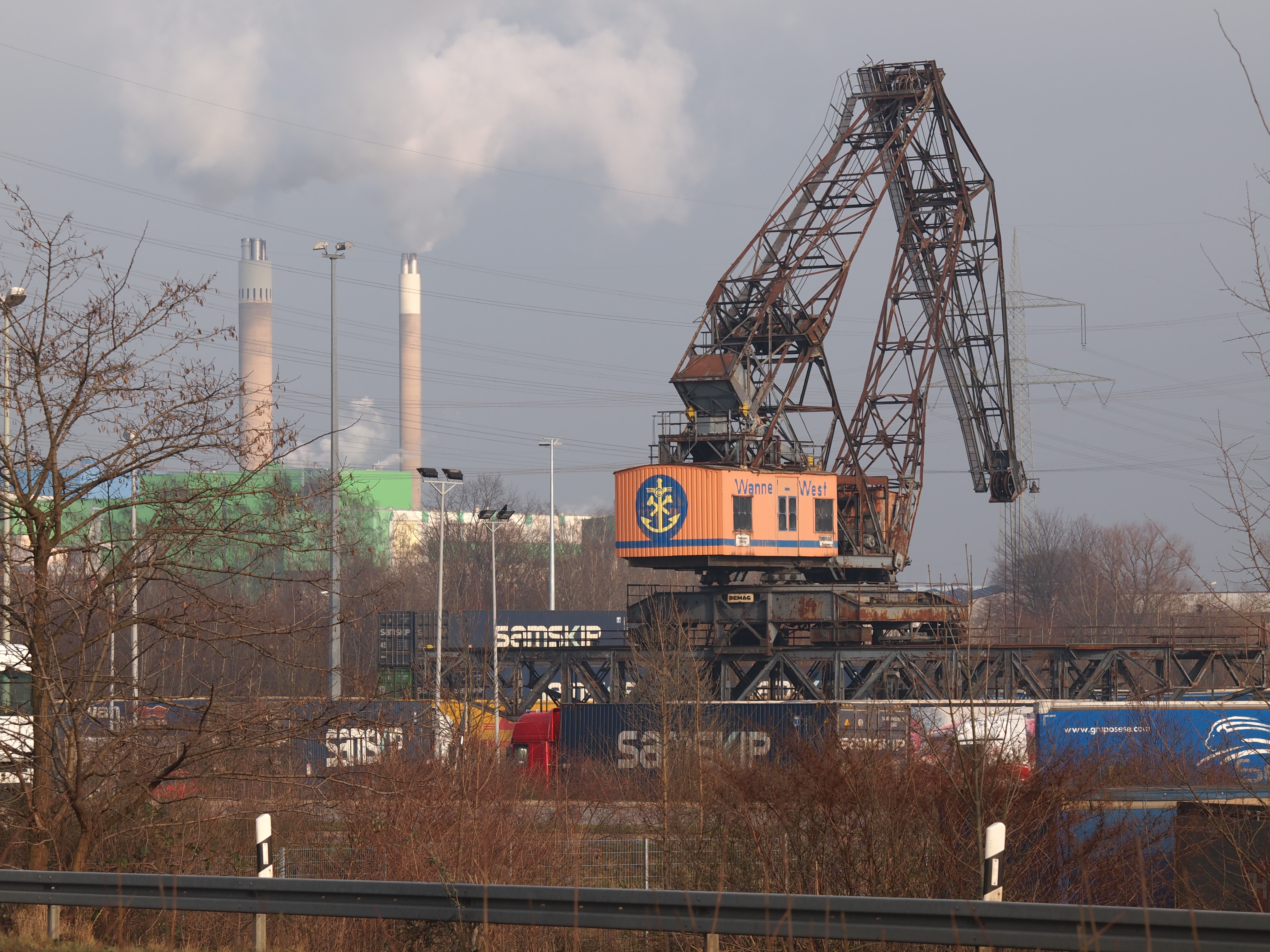 Ehemaliger Hafenkran eines früheren Hafenbeckens im Hafen Herne West am Rhein-Herne-Kanal, Denkmal in Herne-Wanne, Am Westhafen